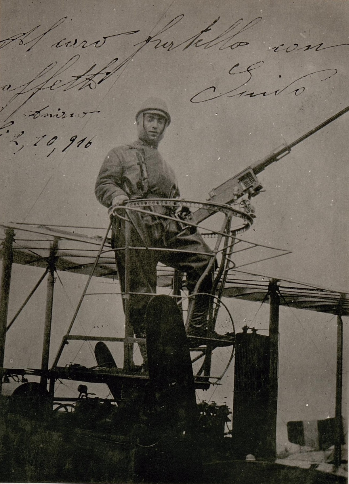 Reproduktion: Maschinengewehrturm eingebaut auf einem itl. Caproni-Flugzeug. (24/6.1917.)